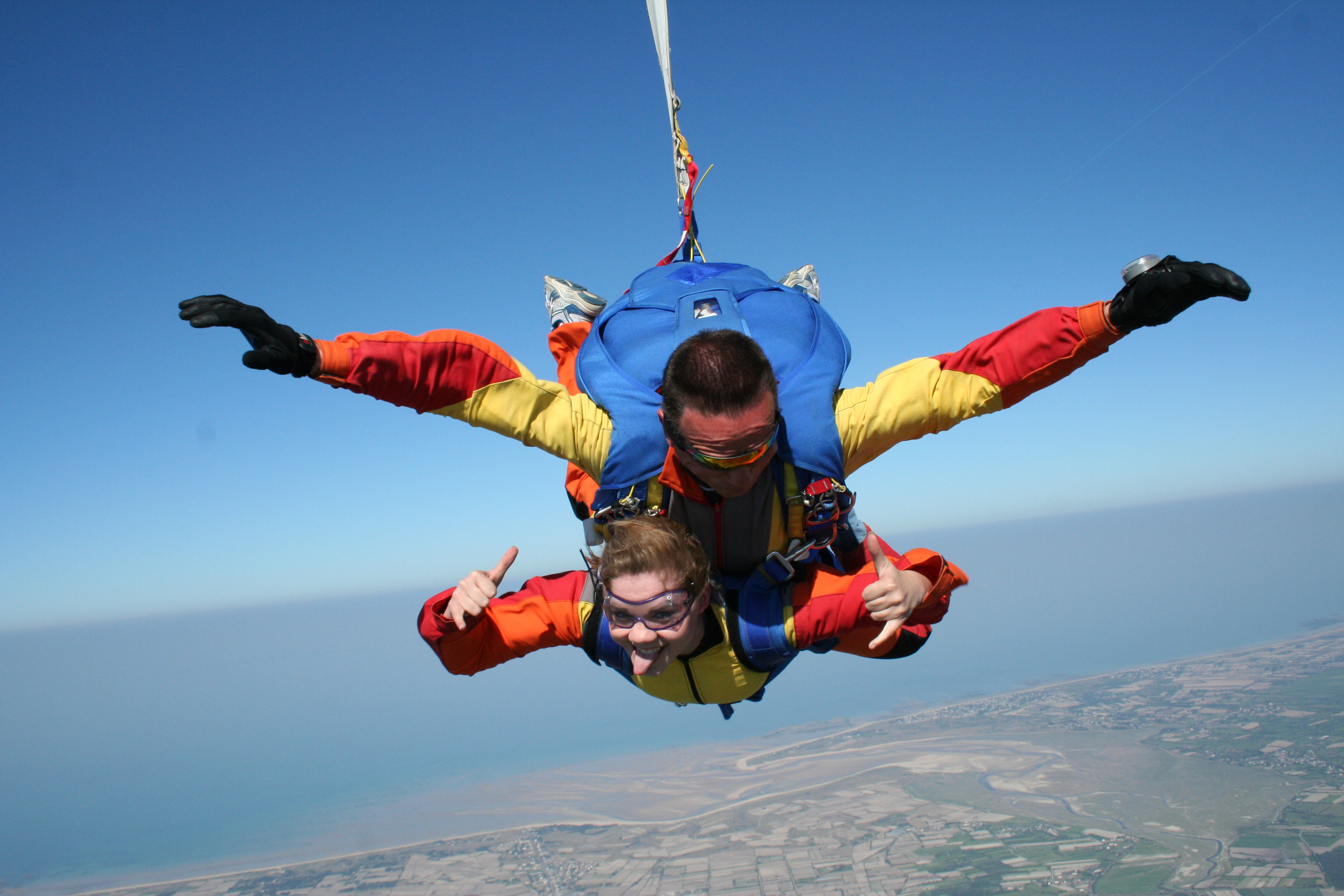 La chute libre en parachute tandem rend un peu fou !